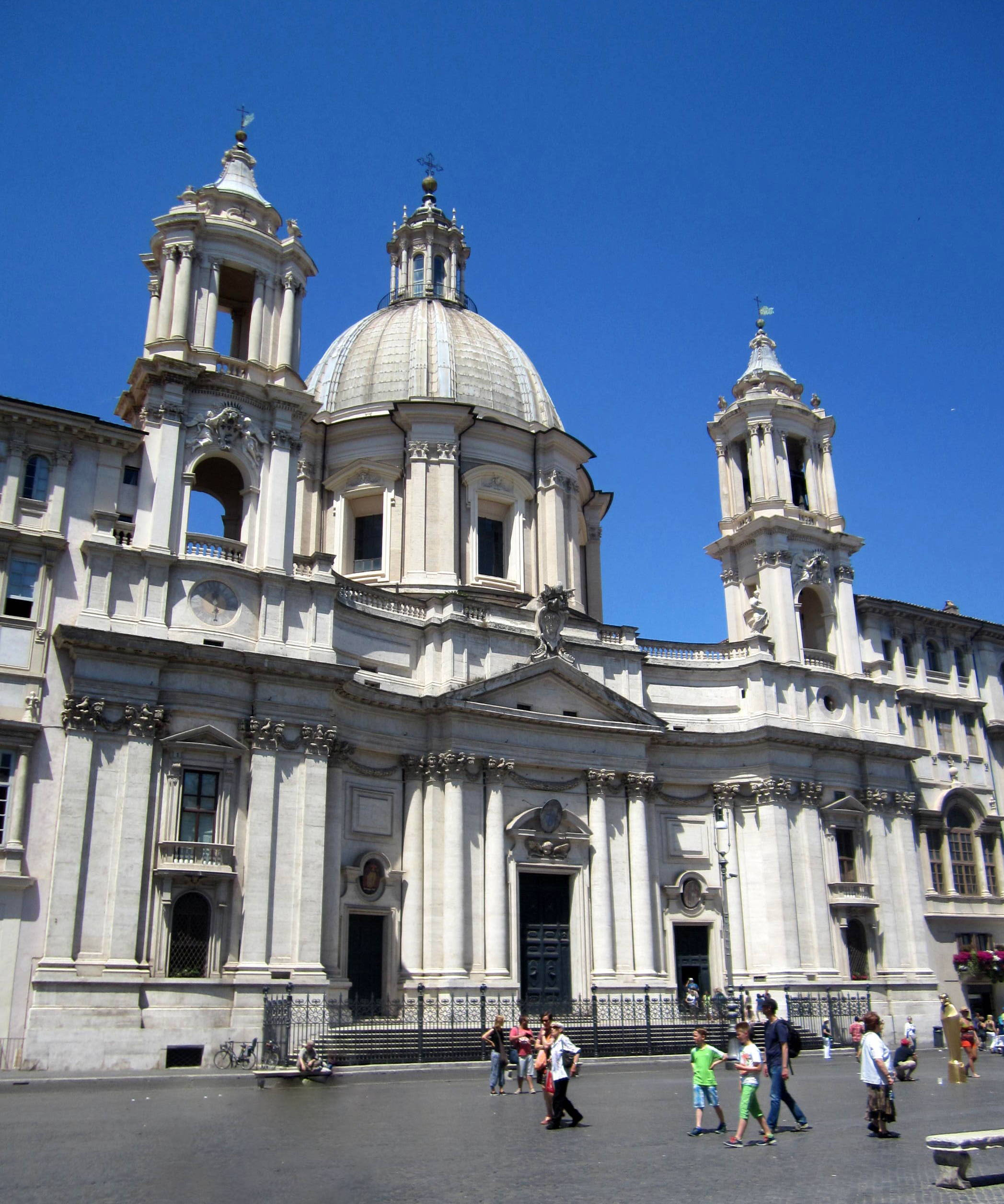 Chiesa di San'Agnese in Agone in Piazza Navona a Roma